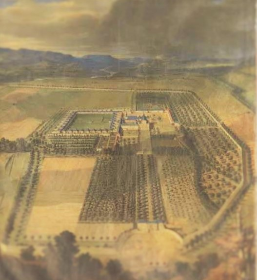 Perspective de la chartreuse établie à partir des hauteurs de Villers-sur-le-Roule.